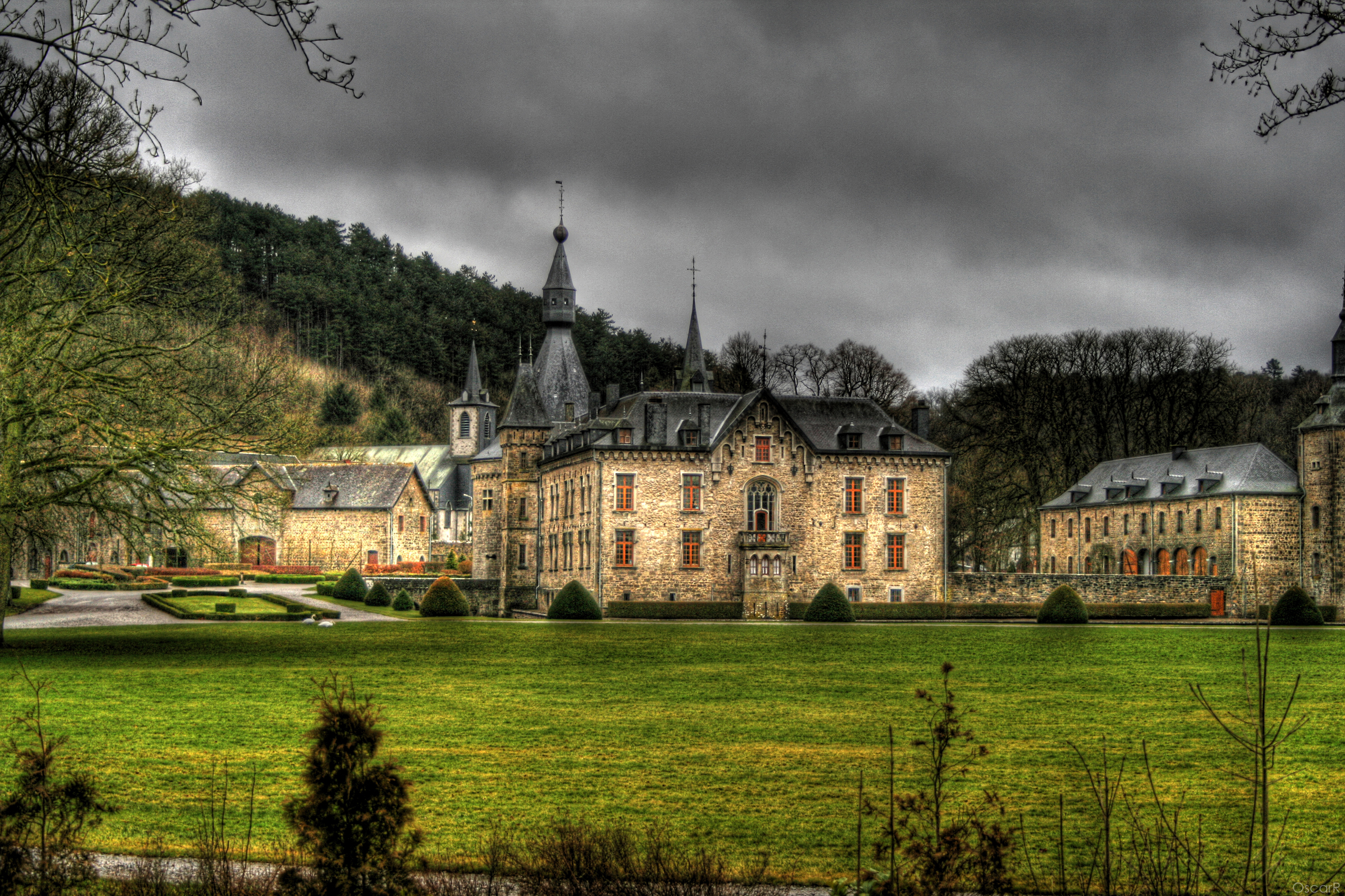 Das Schloss Boussu-en-Fagnes in Couvin